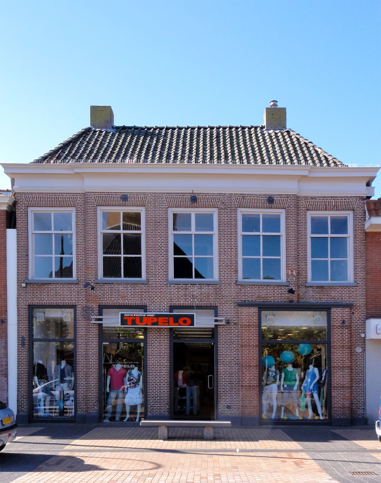 Van_Harenstraat 14 in Sint-Annaparochie